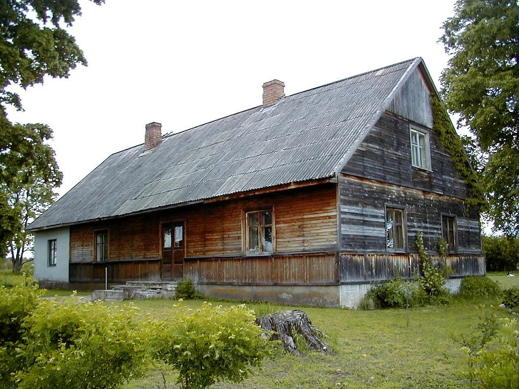 Siliņi - Sudrabu Edžus muzejs Meņģelē 2001-06-02